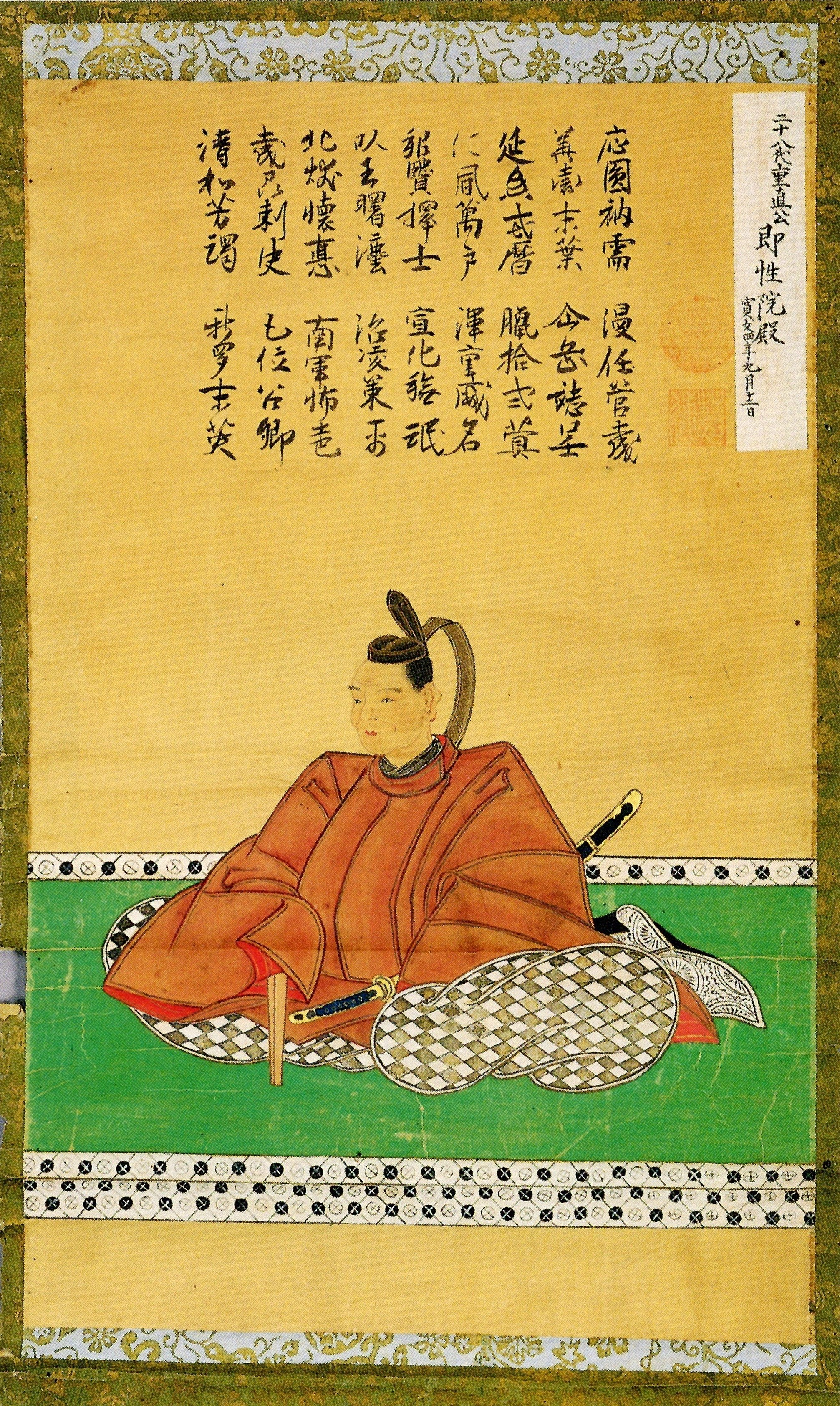 南部重直の肖像。